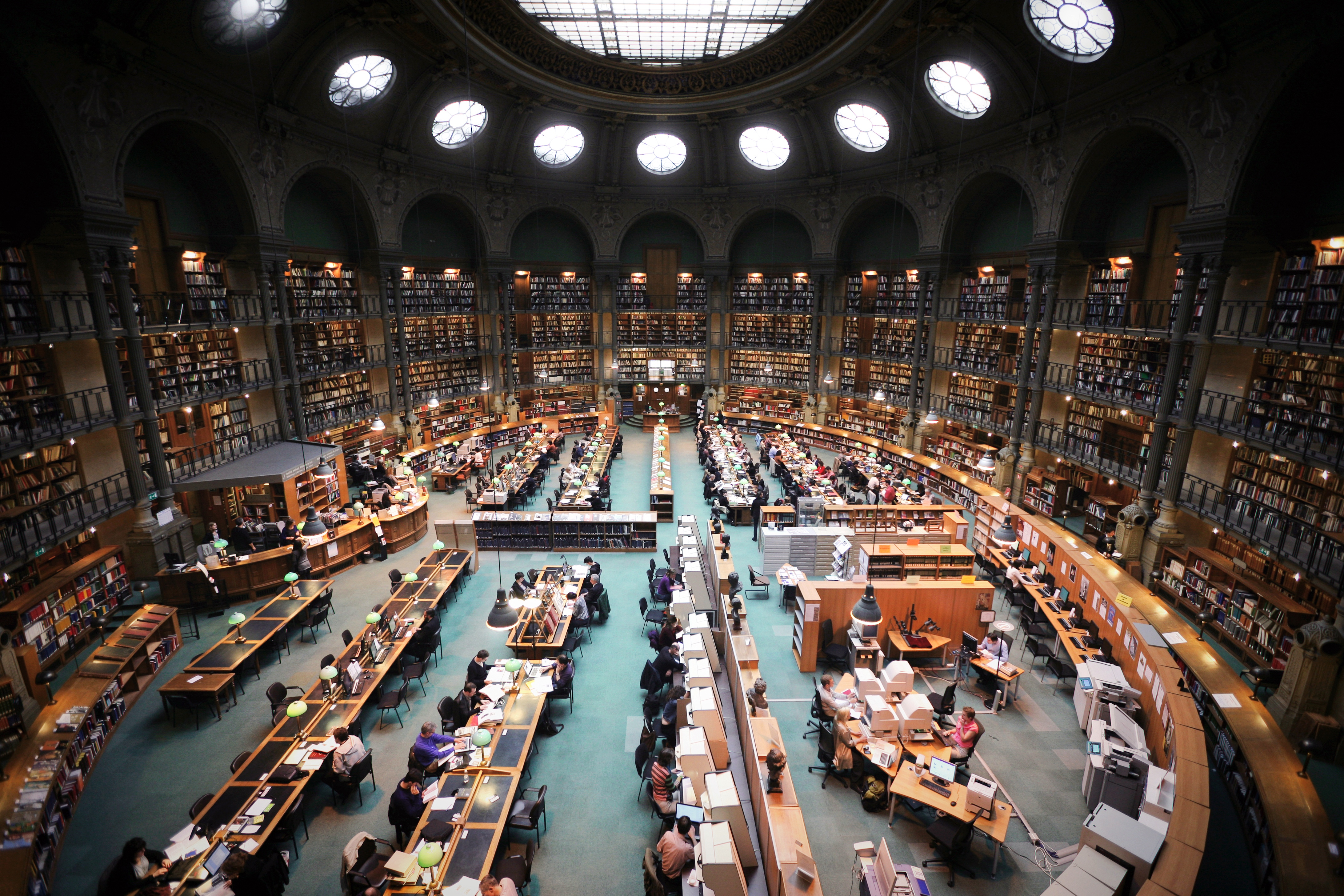 France, Paris, Bibliothèque nationale de France, site Richelieu, salle ovale.